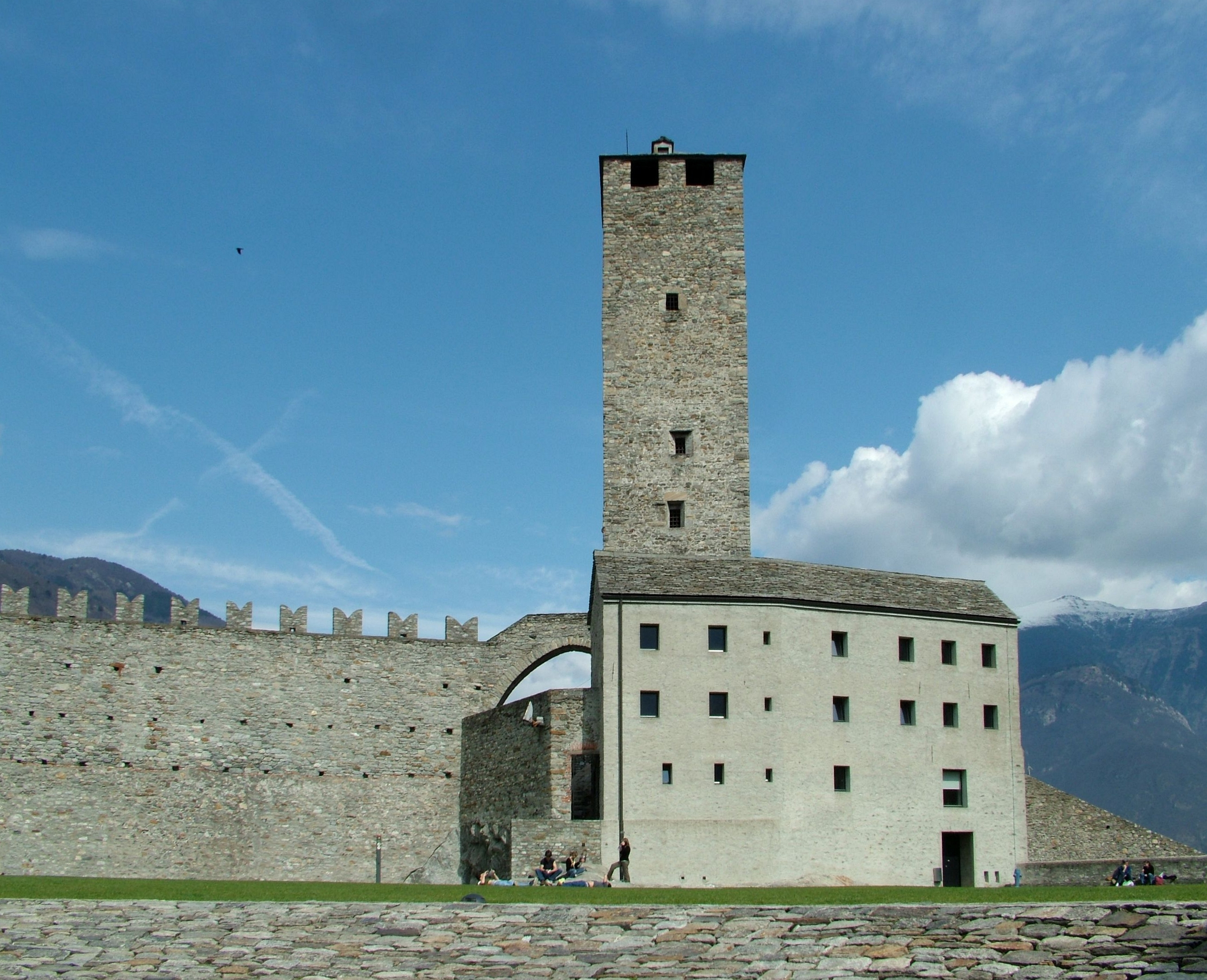 Bellinzona, Castelgrande der Innenhof